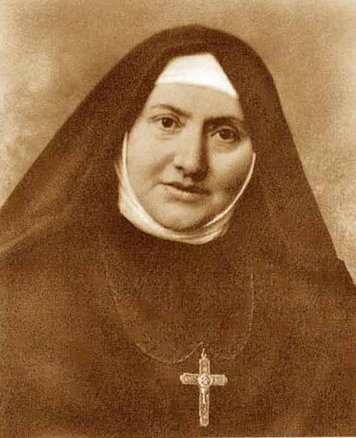 Die italienische Ordensgründerin Caterina Comensoli, Ordensname Geltrude Comensoli (1847-1903)